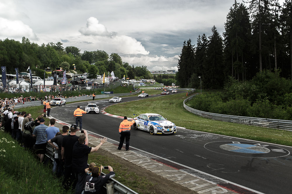 Einführungsrunde beim 24-Stunden-Rennen im Mai 2016 auf dem Nürburgring. Veröffentlichung mit freundlicher Genehmigung von Björn Fey. Im Vordergrund: Startnummer 308, BMW M235i Racing, Team Securtal Sorg Rennsport, Fahrer: Eichenberg Heiko, Warum Kevin, Guenther Felix, Oberheim Moritz dahinter: Startnummer 202, Seat Leon TCR, mathilda Racing - Team pistenkids, Fahrer: Paatz Michael, Niedzwiedz Klaus, Friedhoff Axel, Friedhoff Max Startnummer 65, Aston Martin Vantage V1, Aston Martin Test Centr Startnummer 77, Aston Martin Vantage V8, STADAvita Racing Team